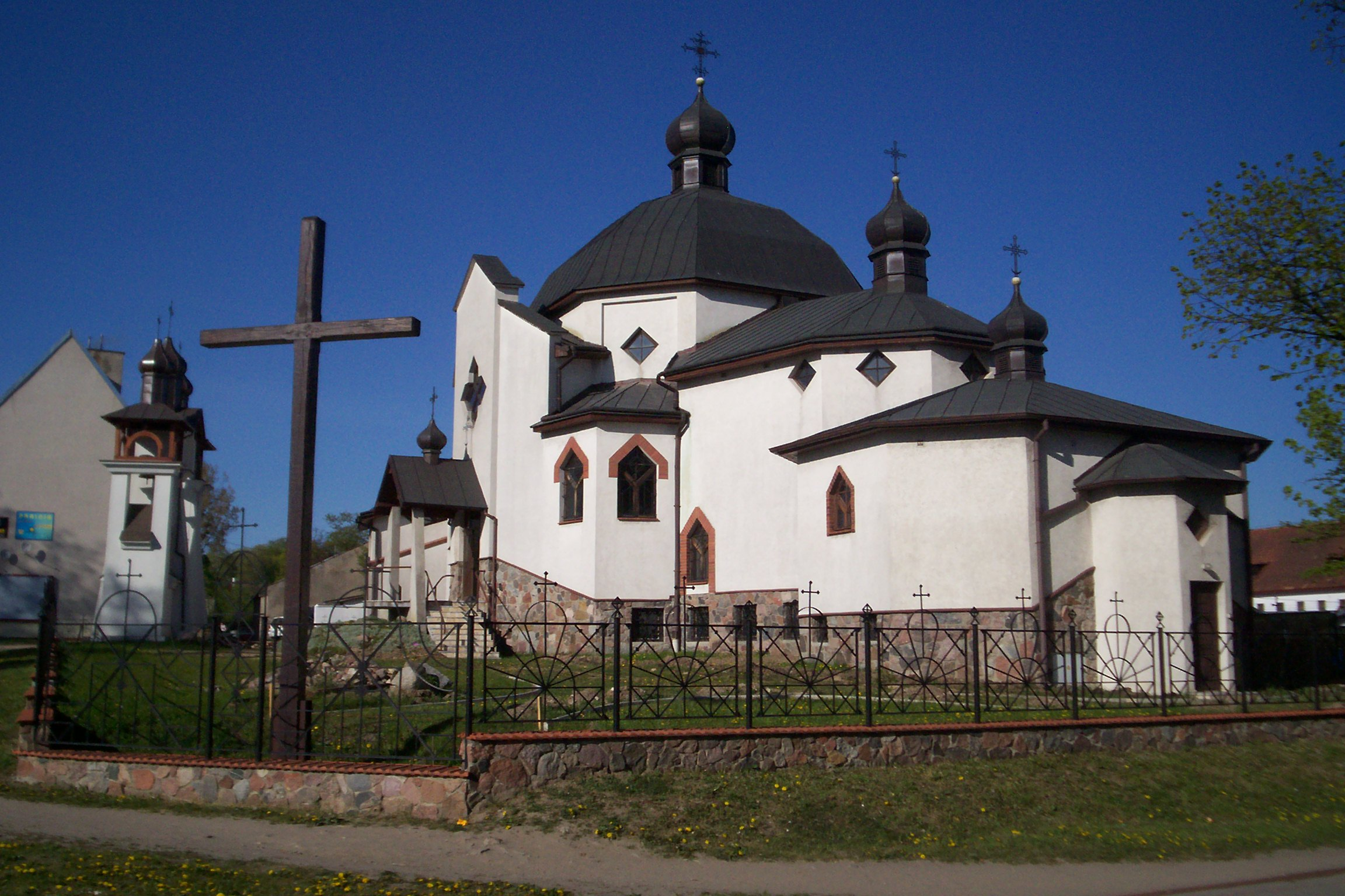 Cerkiew greko-katolicka w Kętrzynie